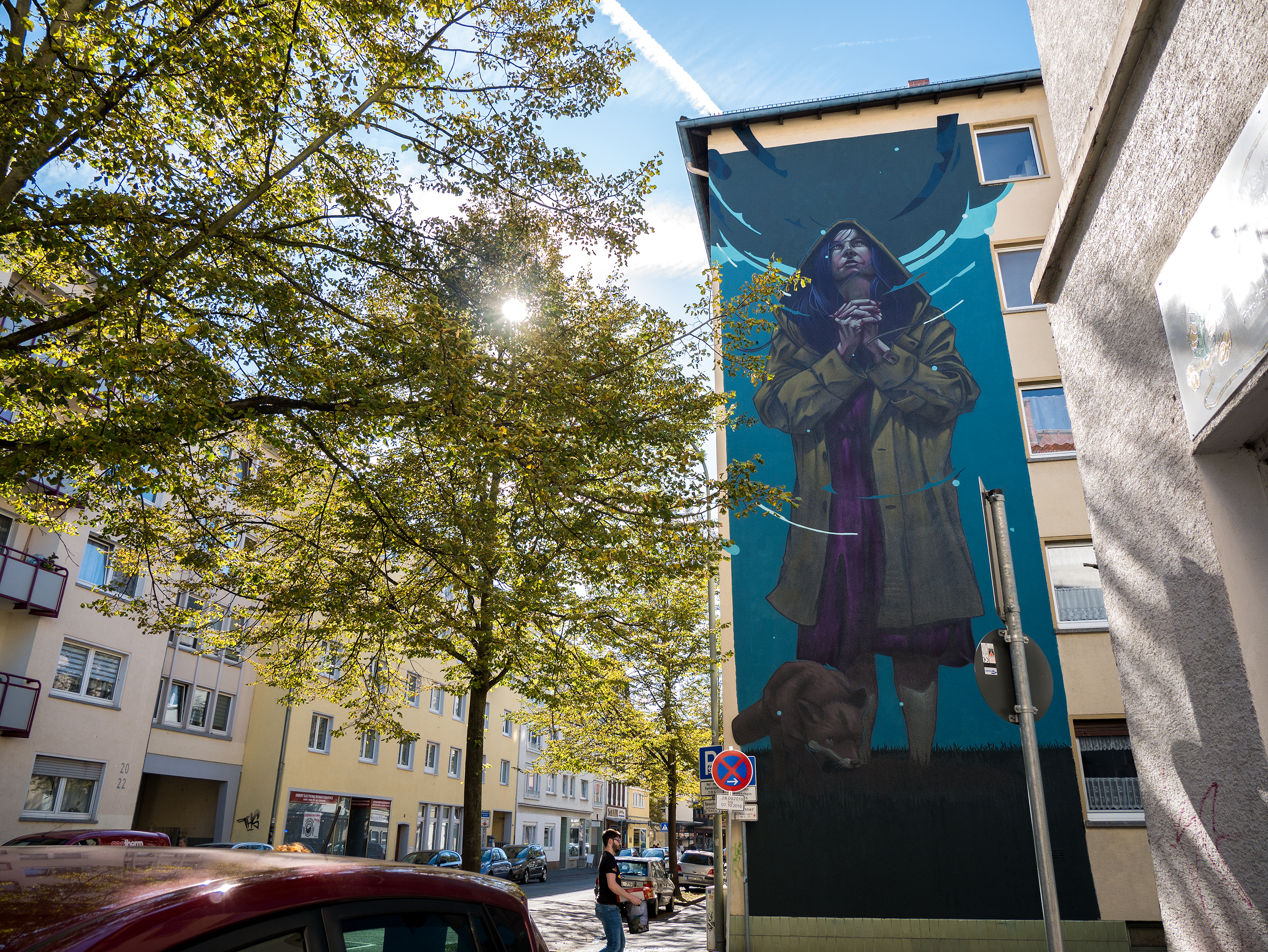 "Who is listening" in Giessen/Walltorstrasse 25. Das Werk entstand für das Festival "River Tales"